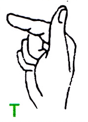 Der Buchstabe T im deutschen Fingeralphabet, entsprechend einer Infokarte des Landesverbandes Bayern der Gehörlosen e.V. (